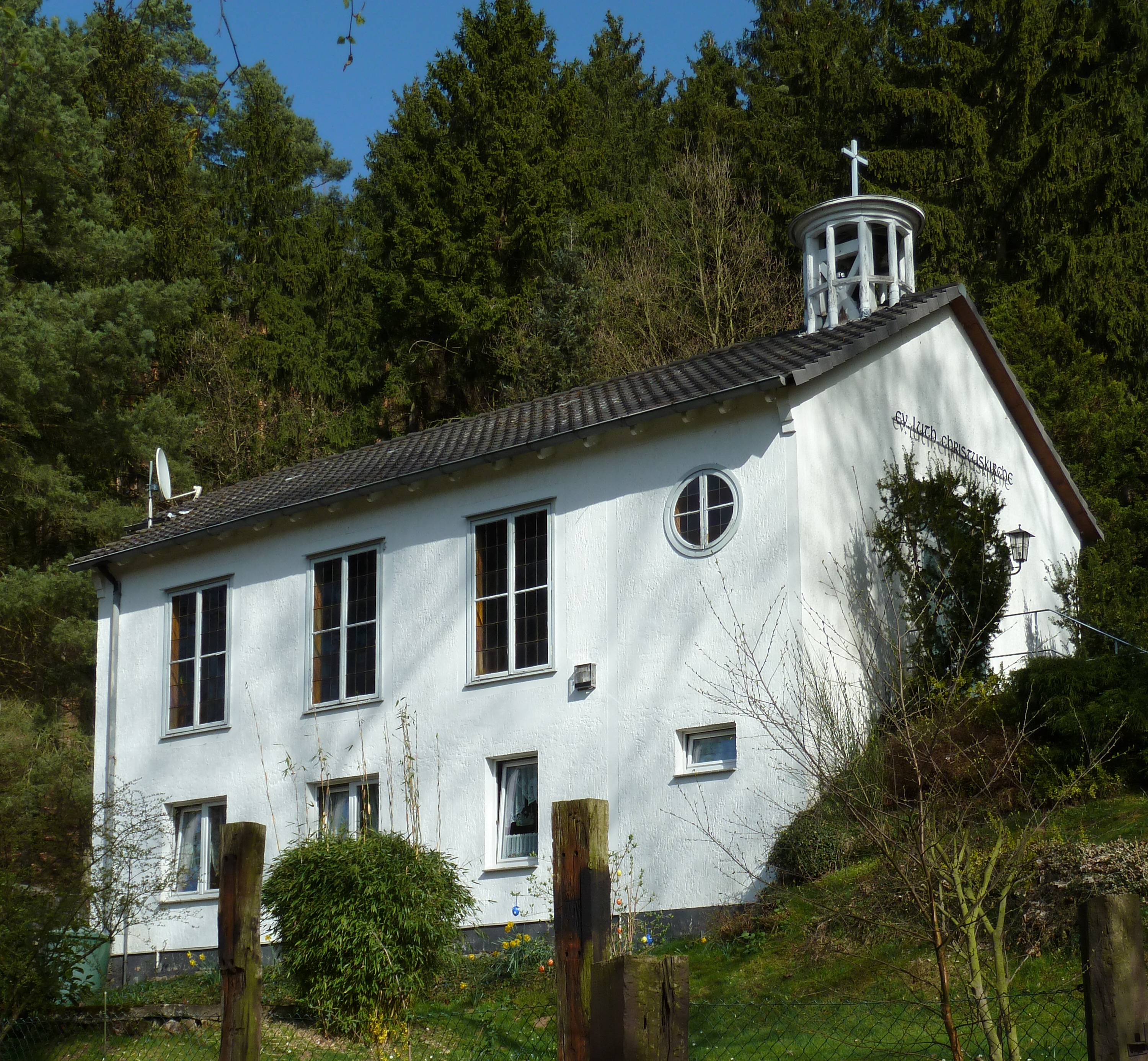 Kirche der Christusgemeinde Volkmarshausen (Stadtteil von Hann. Münden) im Kirchenbezirk Niedersachsen-Süd der Selbständigen Evangelisch-Lutherischen Kirche (SELK), geweiht im April 1955